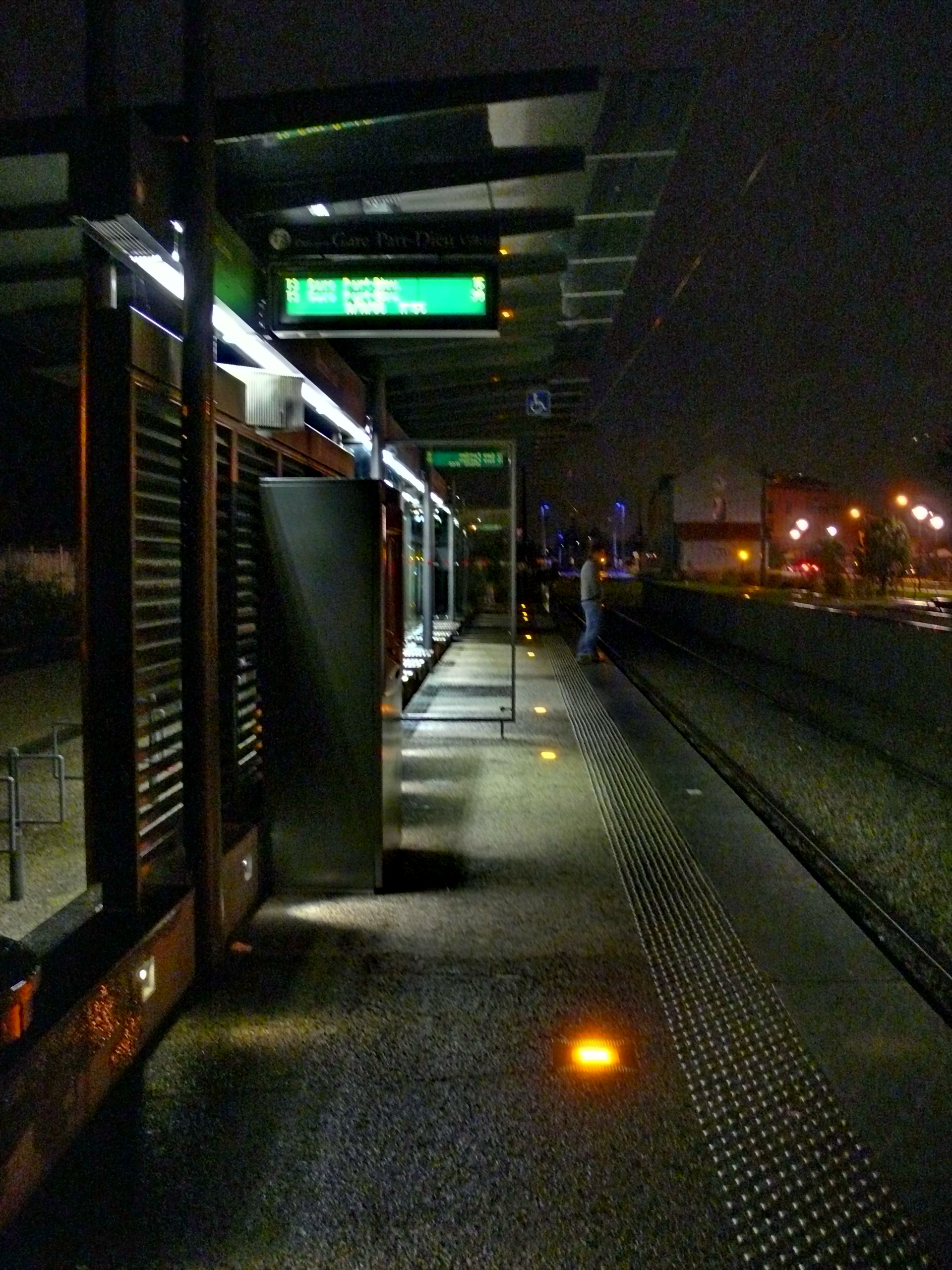 Vue nocturne des aménagements de la station Meyzieu-Gare du Tramway de Lyon (ligne T3)